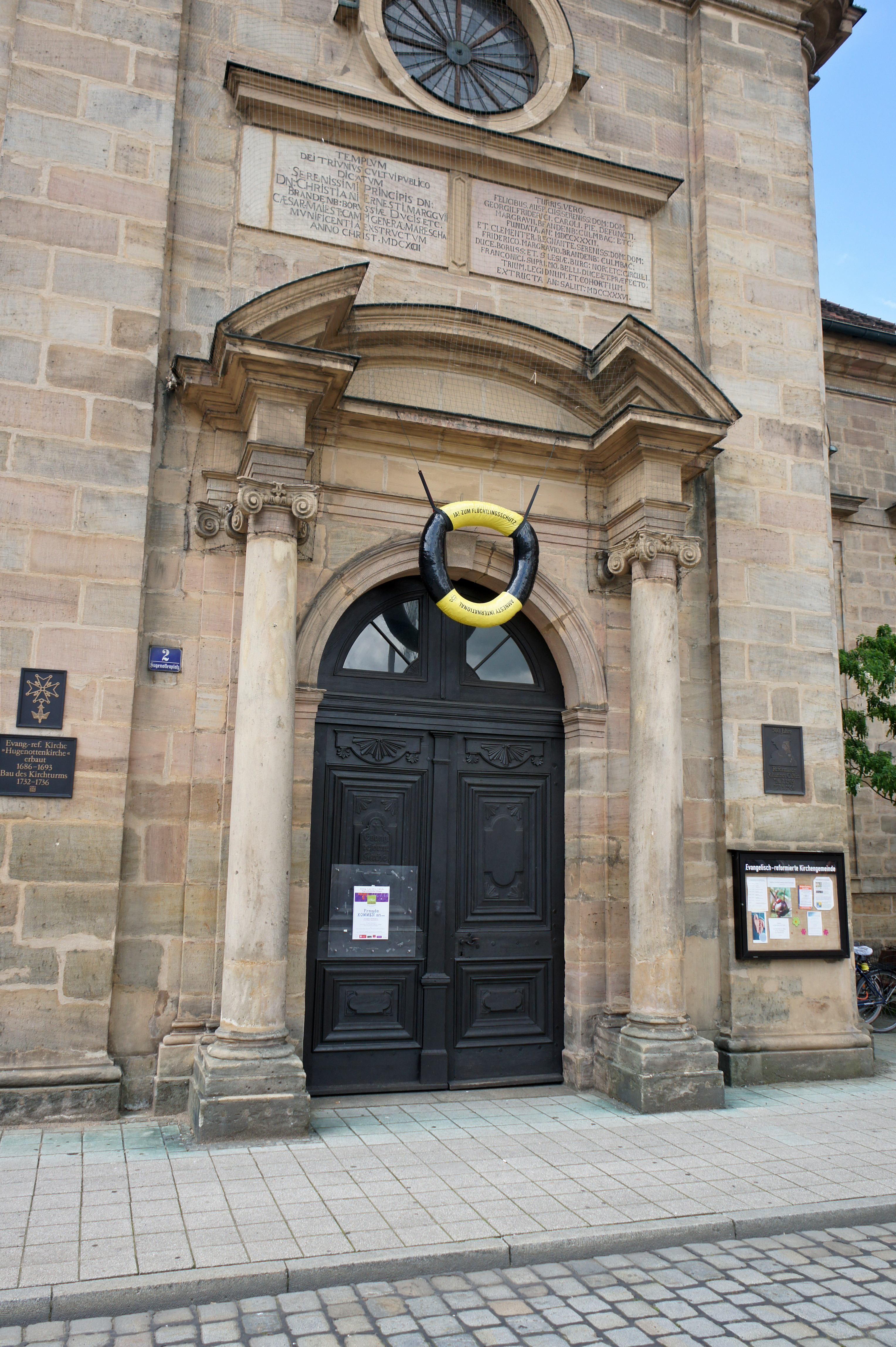 Eingangsportal der Hugenottenkirche, darüber ein von Amnesty Internationalangebrachter symbolischer, schwarz-gelber Rettungsring für Flüchtlinge